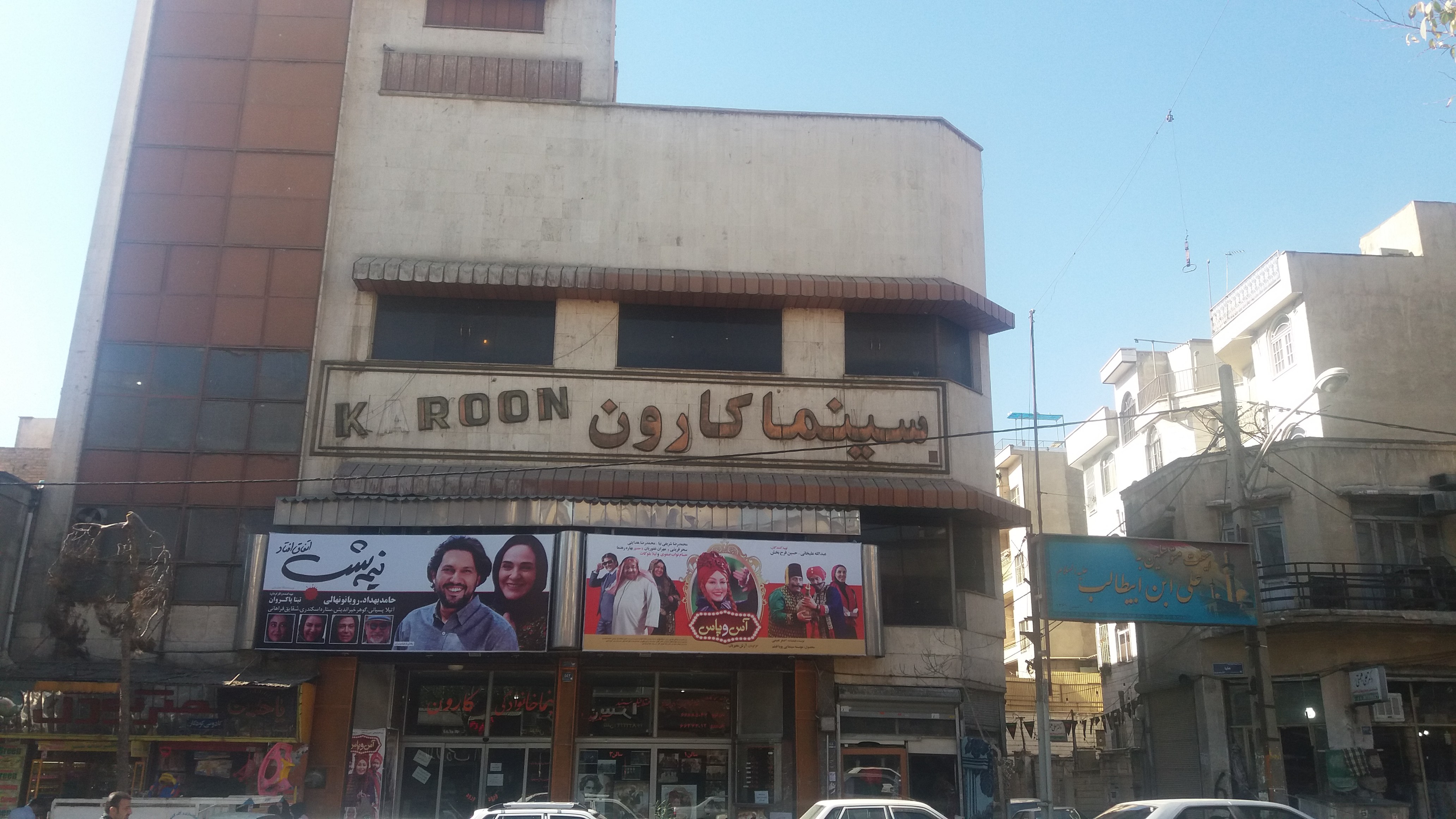 سینما کارون، تهران، ایران - آبان ۱۳۹۵